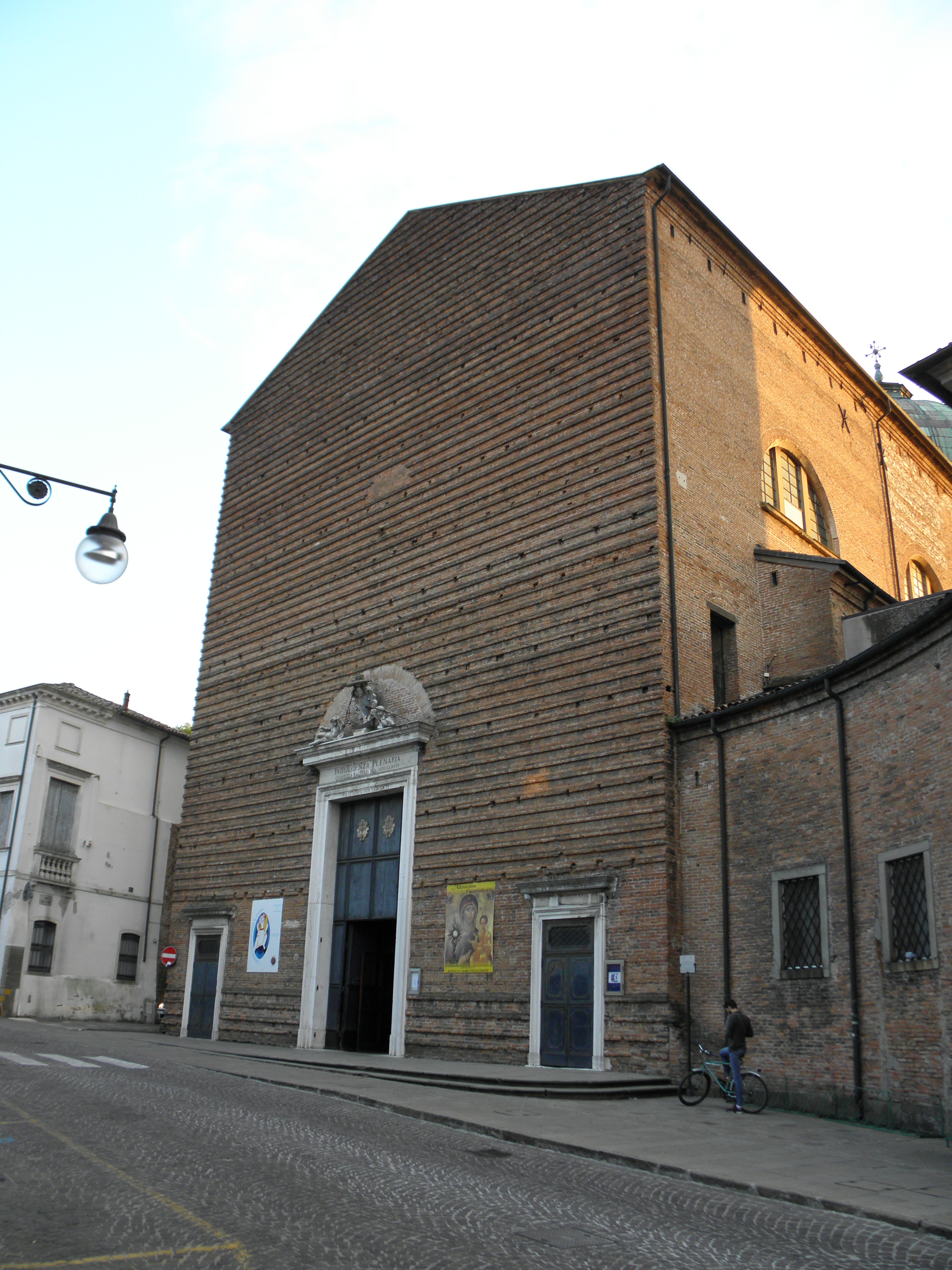 Este, la basilica di Santa Maria delle Grazie.